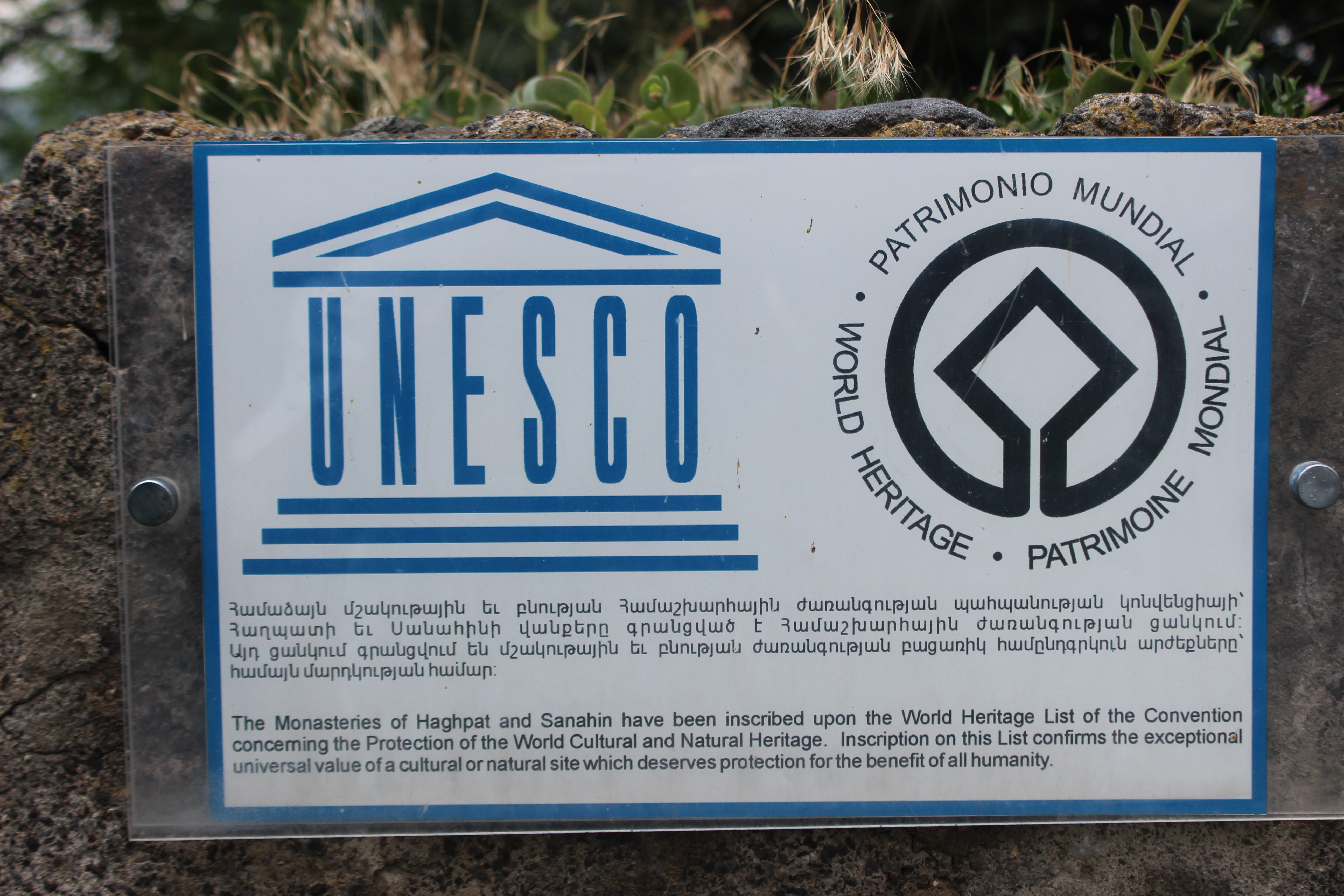 Վանական Համալիր Հաղպատ 10-20 դարեր, գյուղի հարավ-արևելյան եզրին 60/33